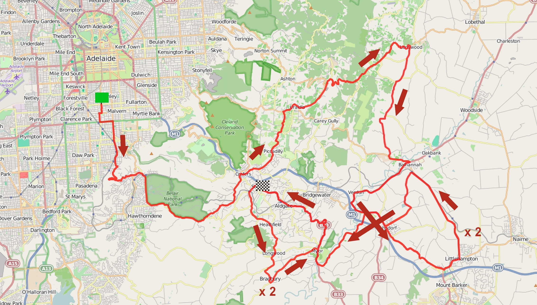 Parcours de la deuxième étape du Tour Down Under 2015. This map may be incomplete, and may contain errors. Don't rely solely on it for navigation.